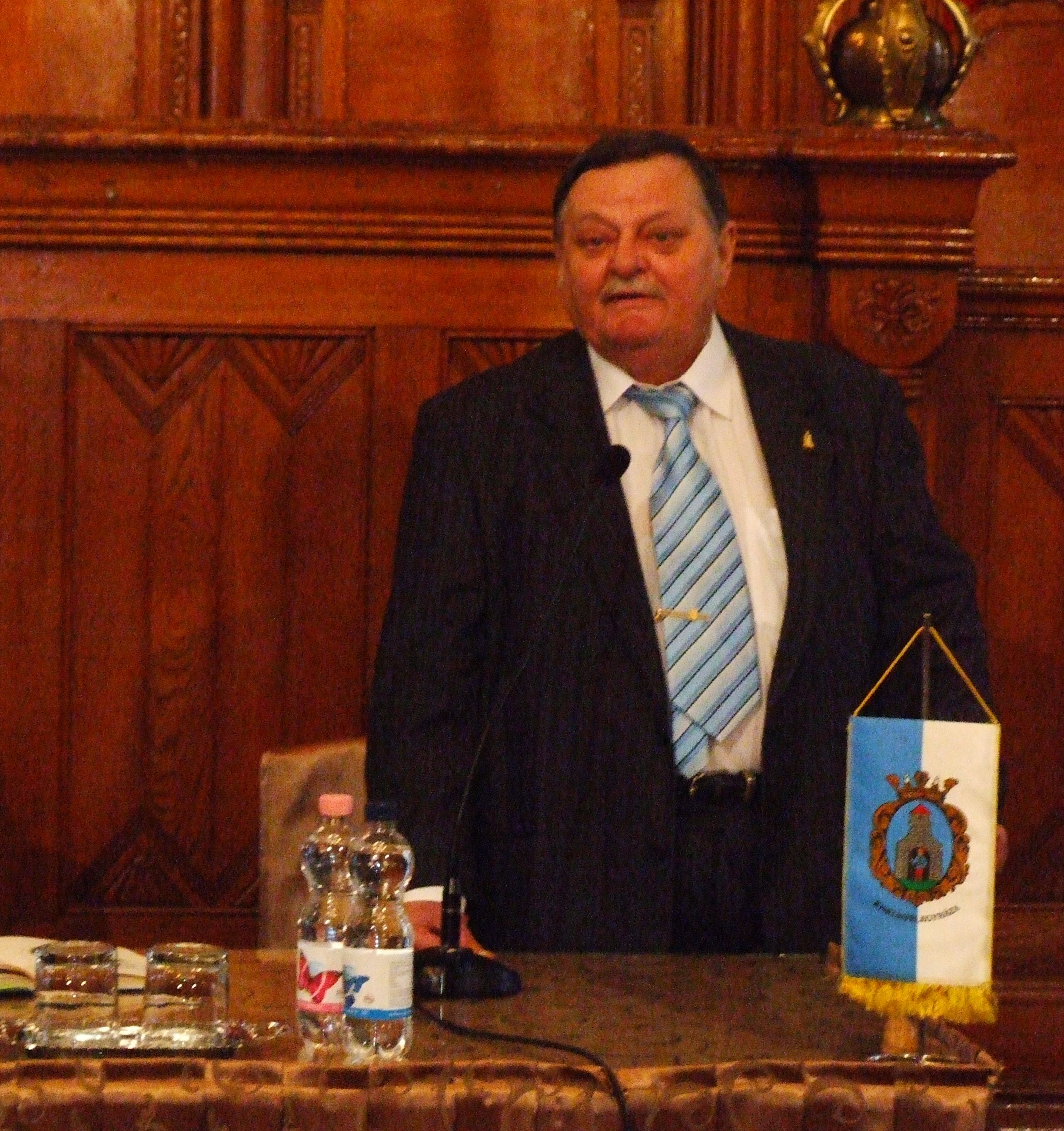 Magyari Béla (Kiskunfélegyháza, 1949. augusztus 8. – 2018. április 23.) magyar űrhajós, a Szojuz–36 űrhajó tartalékszemélyzetének tagja.